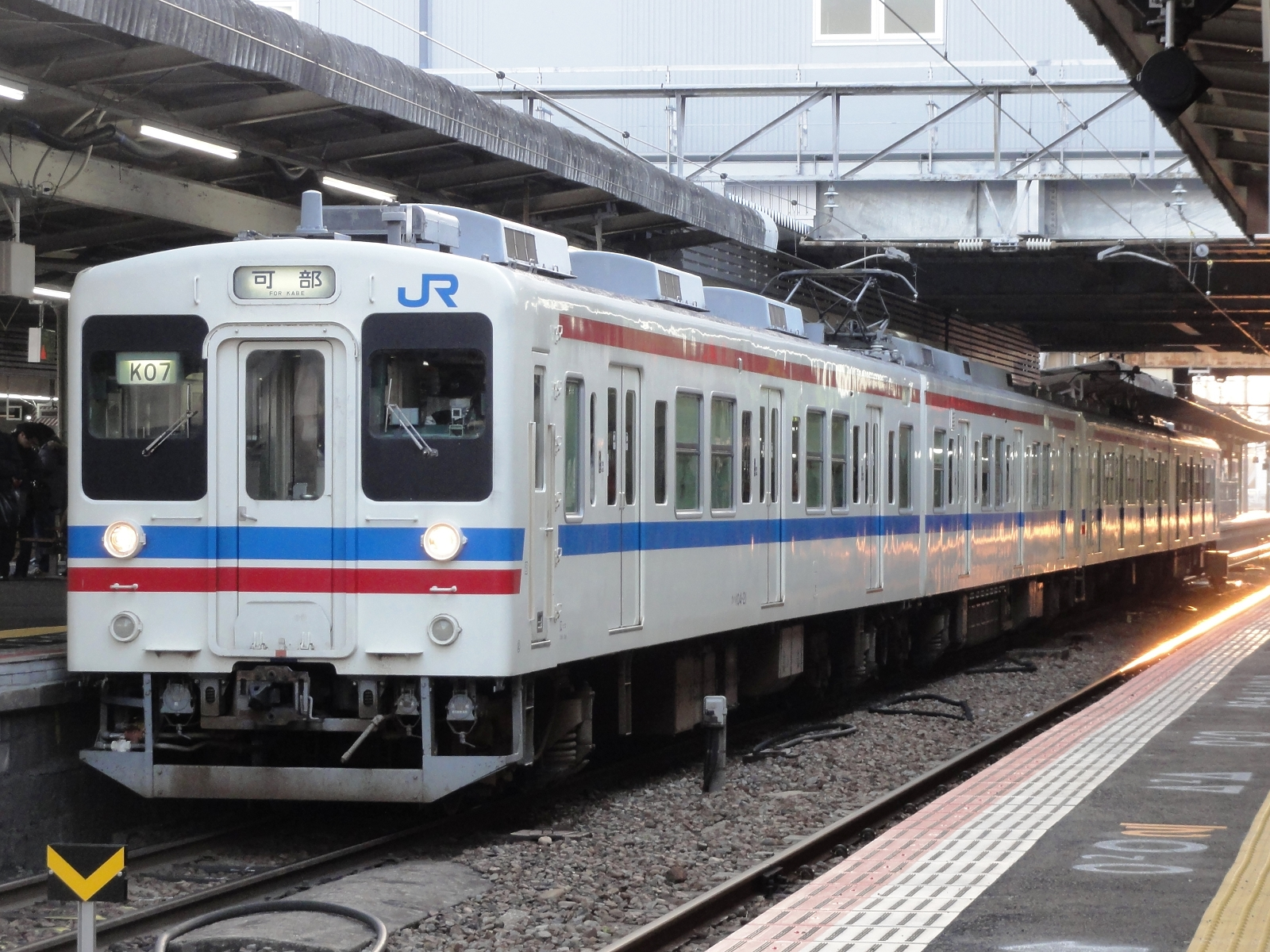 朝のラッシュ時に可部線の運用に就く105系。 増結して4両編成で就いている。下関総合車両所広島支所所属の編成。